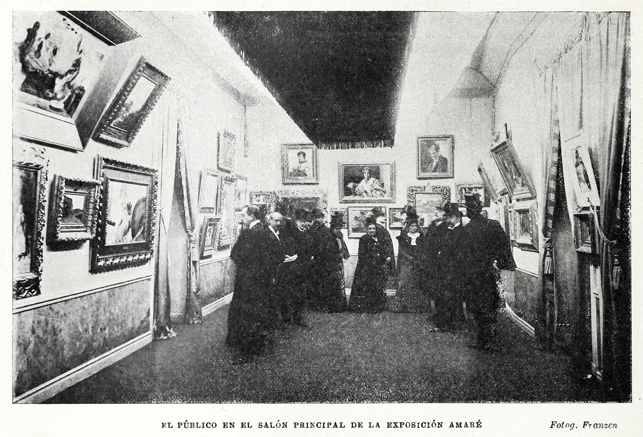 El público en el salón principal de la Exposición Amaré.